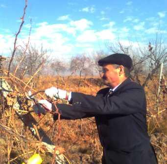 Виноградная плантация,обрезка виноградника (Таджикистан)